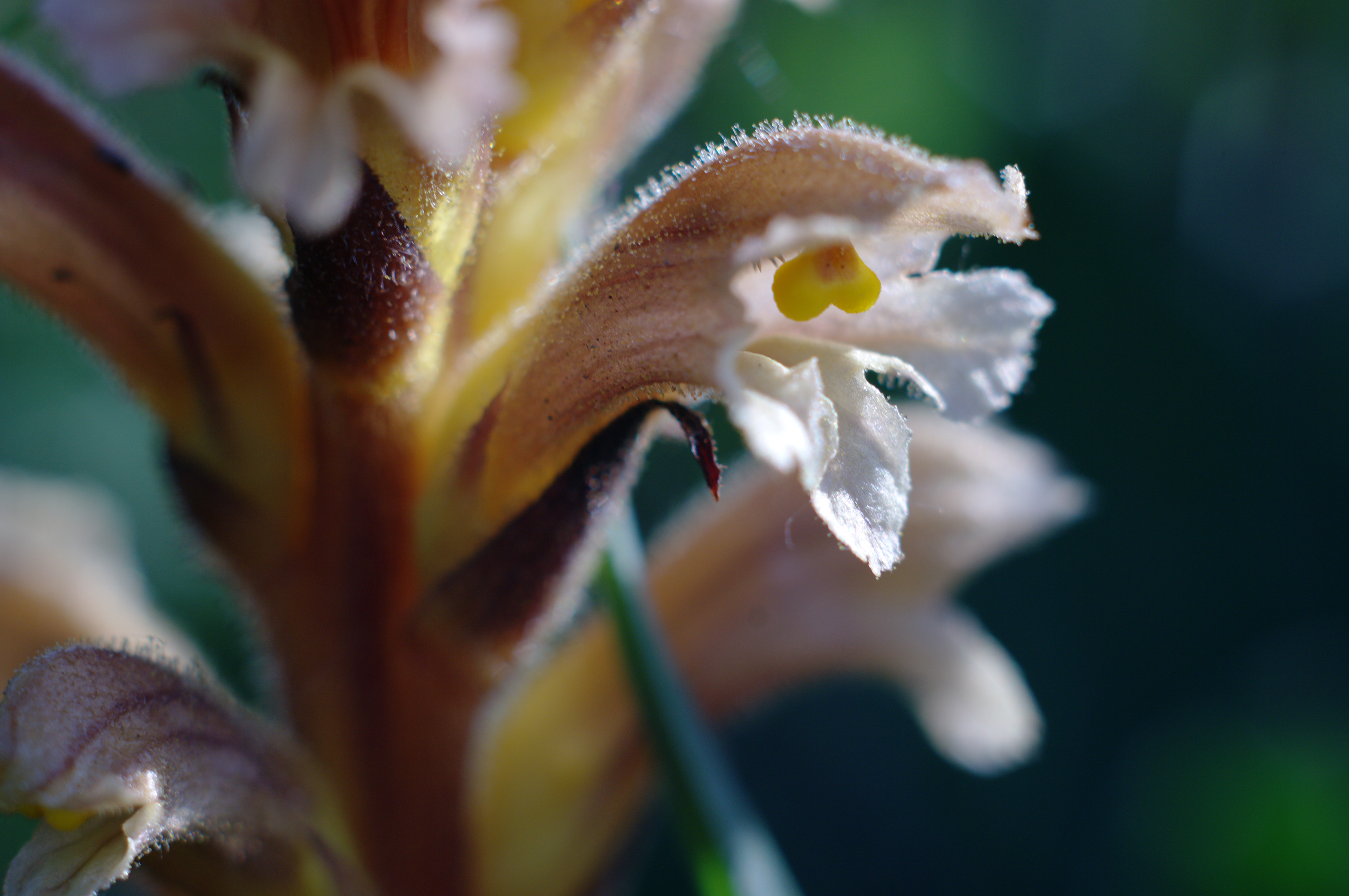 Zaraza czerwonawa Dąbrowa Górnicza, Wzgórze Gołonoskie